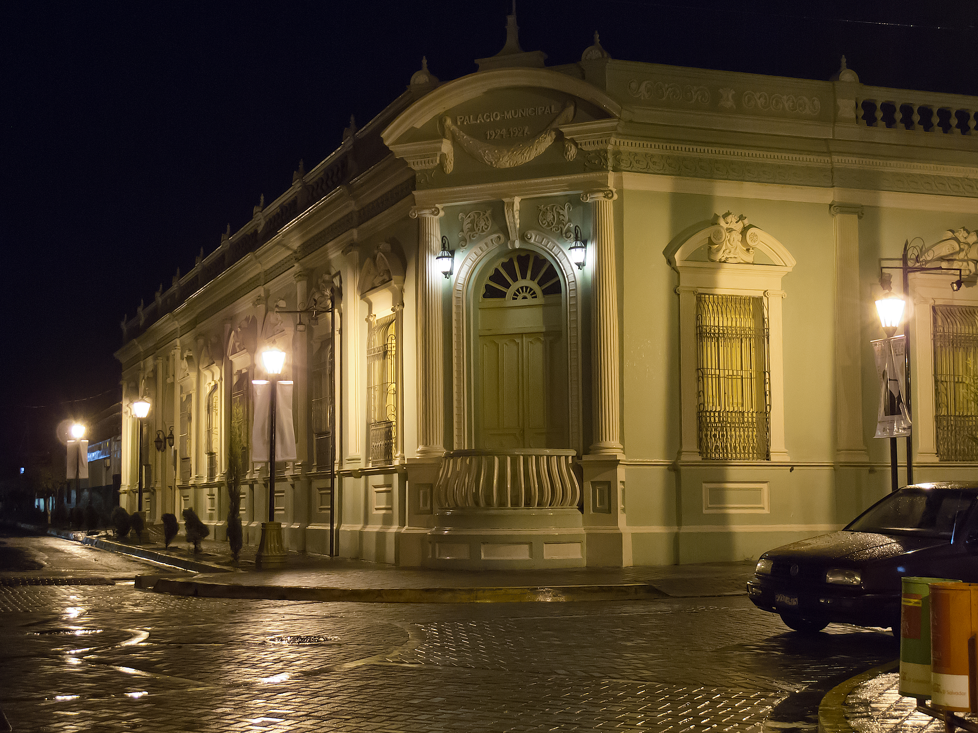 Palacio de Bellas Artes, Santa Tecla, El Salvador